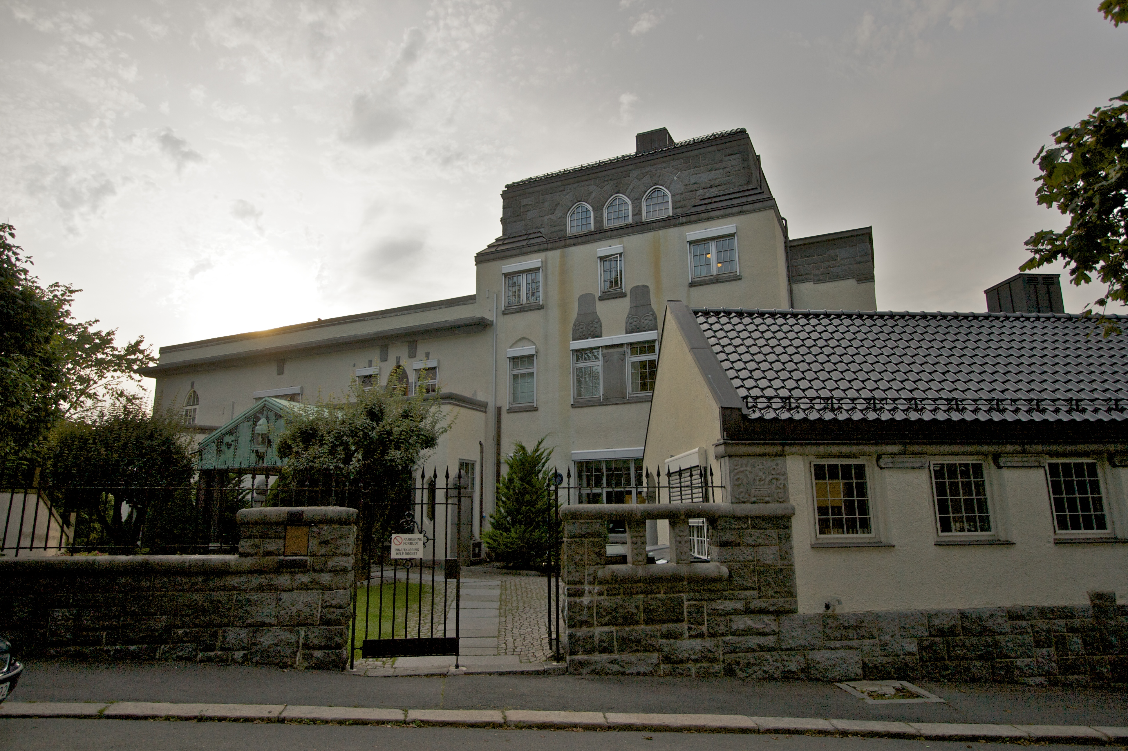 Kristinelundveien 22 i Oslo.